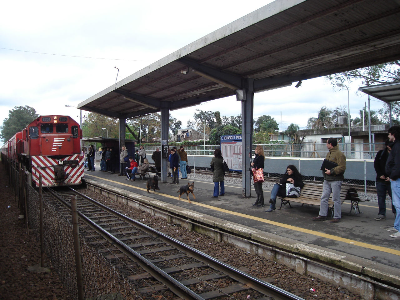 Vista del edificio principal de la estación Los Polvorines del Ferrocarril General Belgrano. Los Polvorines, partido de Malvinas Argentinas, provincia de Buenos Aires, República Argentina.